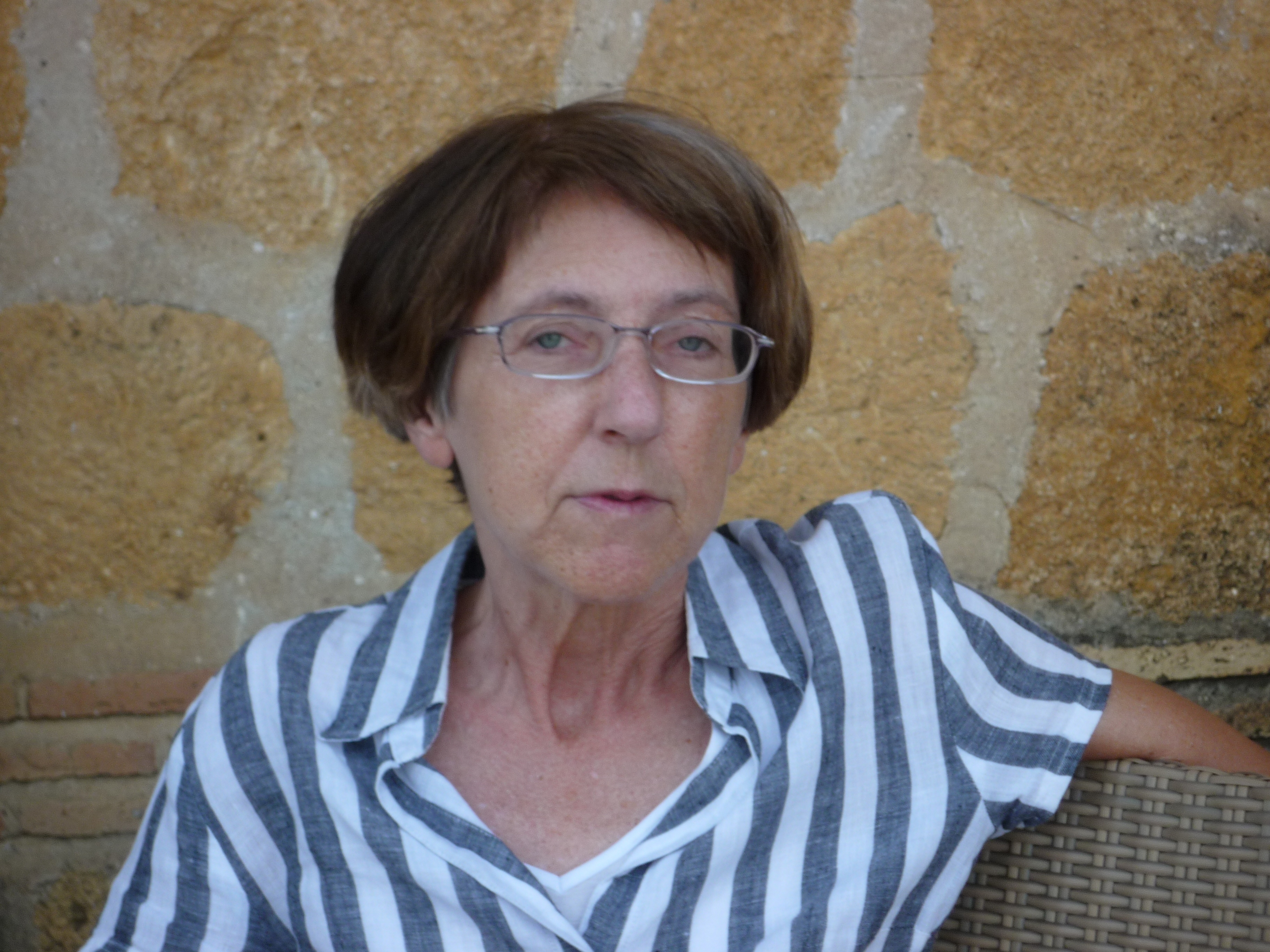 Ein Foto von Ursula Wolf aus dem Jahr 2011